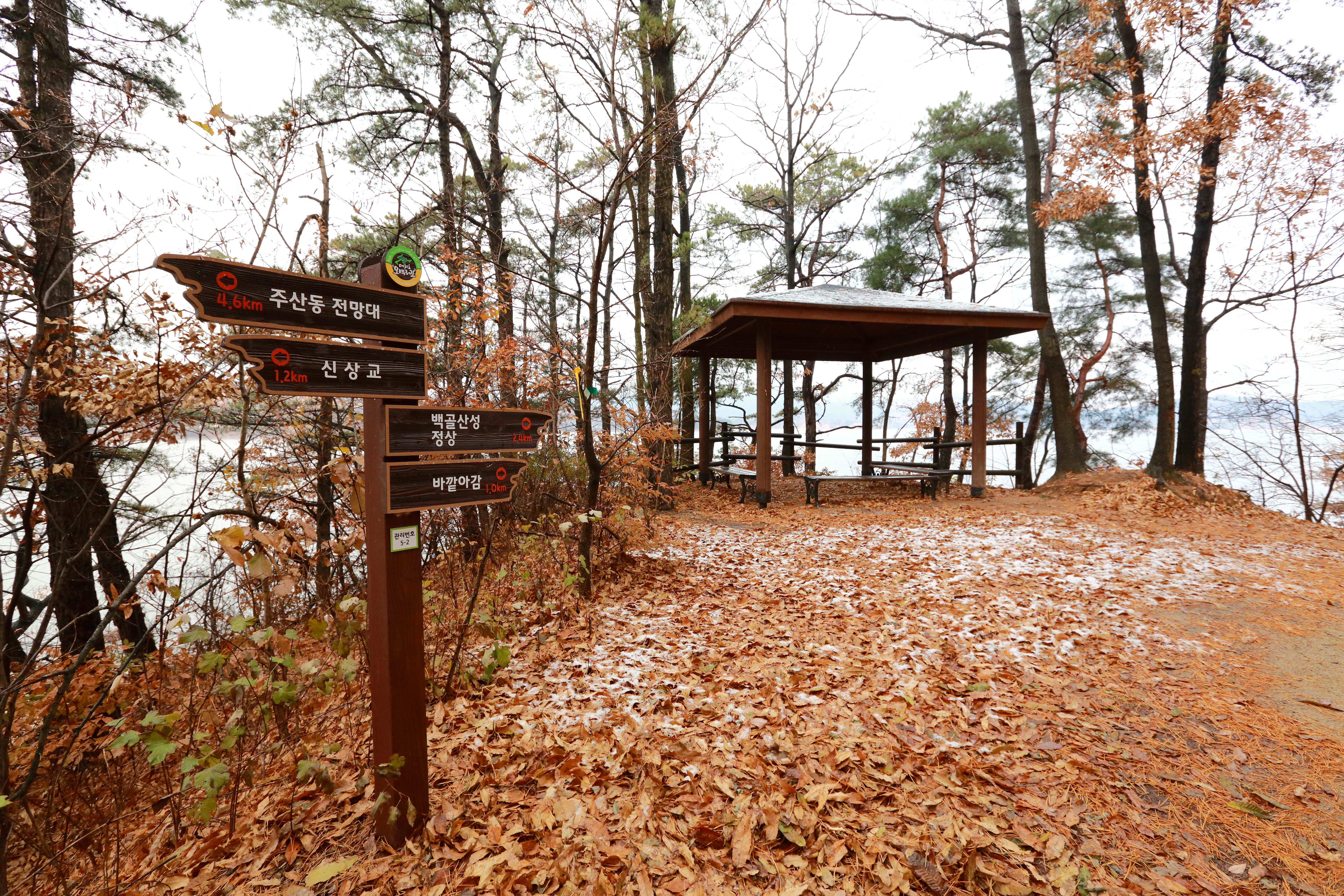 대청호오백리길 5구간_3